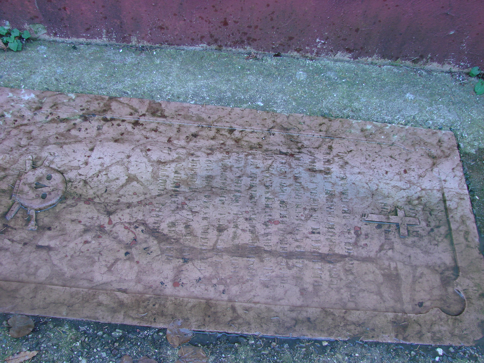 Суходолски манастир